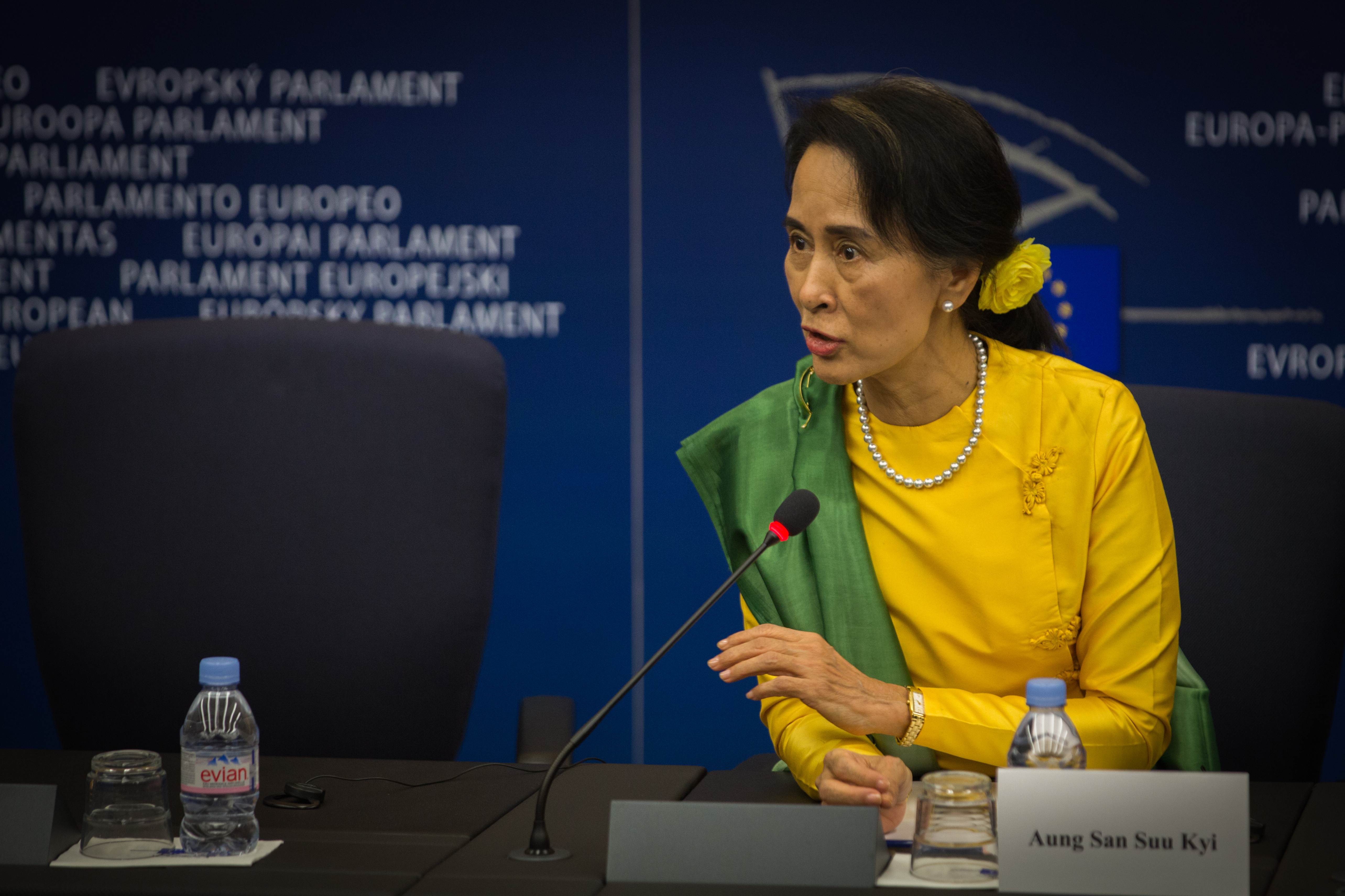 Conférence de presse de Aung San Suu Kyi en compagnie du président du Parlement européen Martin Schulz à Strasbourg le 22 octobre 2013, à l’occasion de la remise du Prix Sakharov.